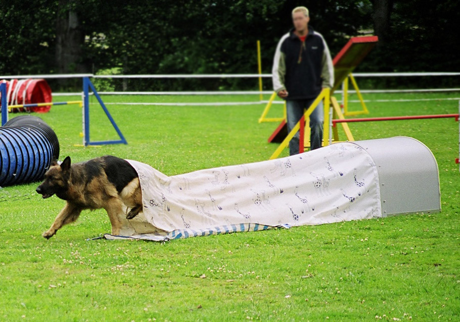 Agility Sacktunnel